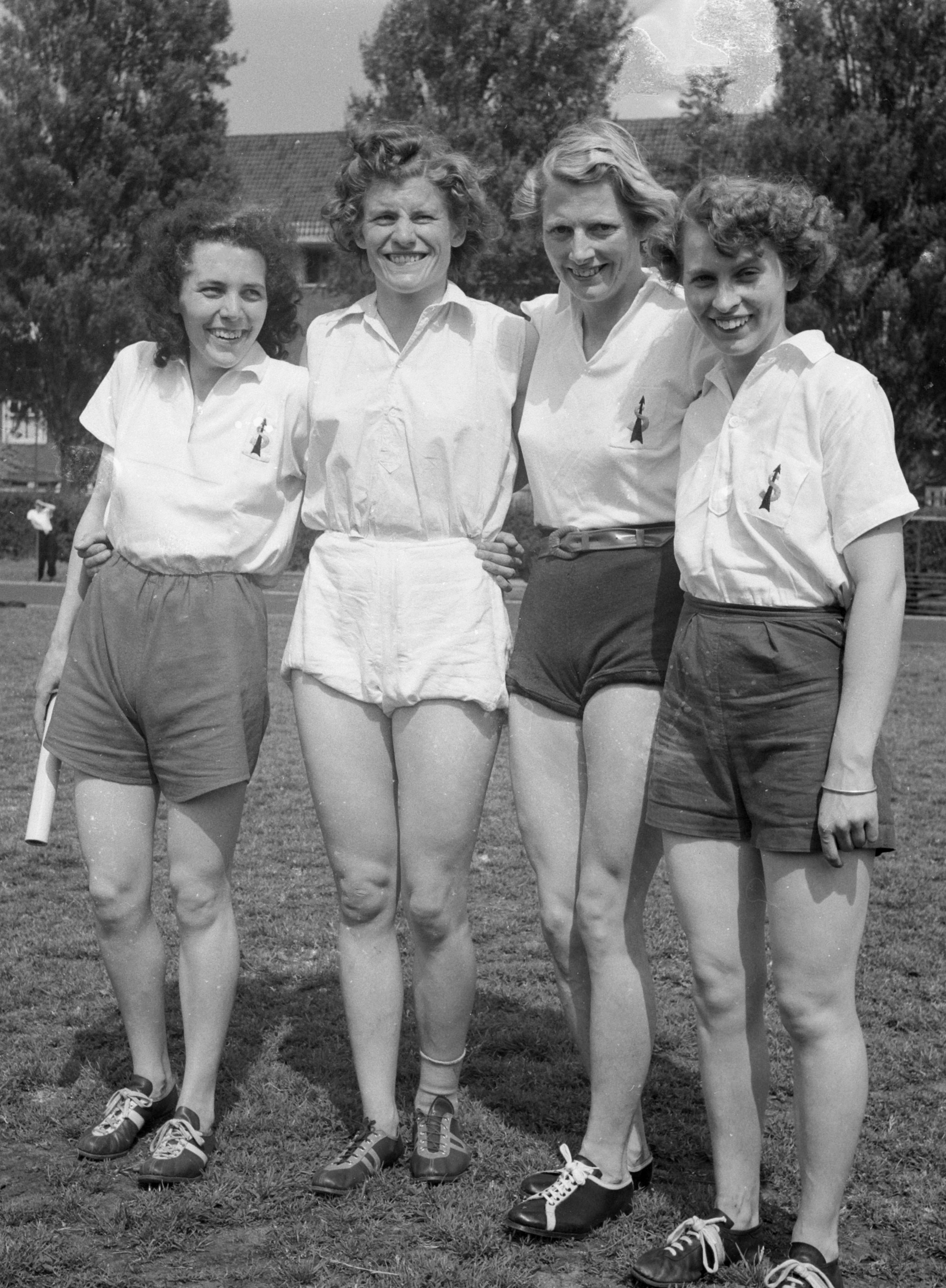 4 x 100 meter estafetteploeg van A.V. Sagitta met vlnr Ria van der Ploeg, Gré de Jongh, Fanny Blankers-Koen en Nel Büch